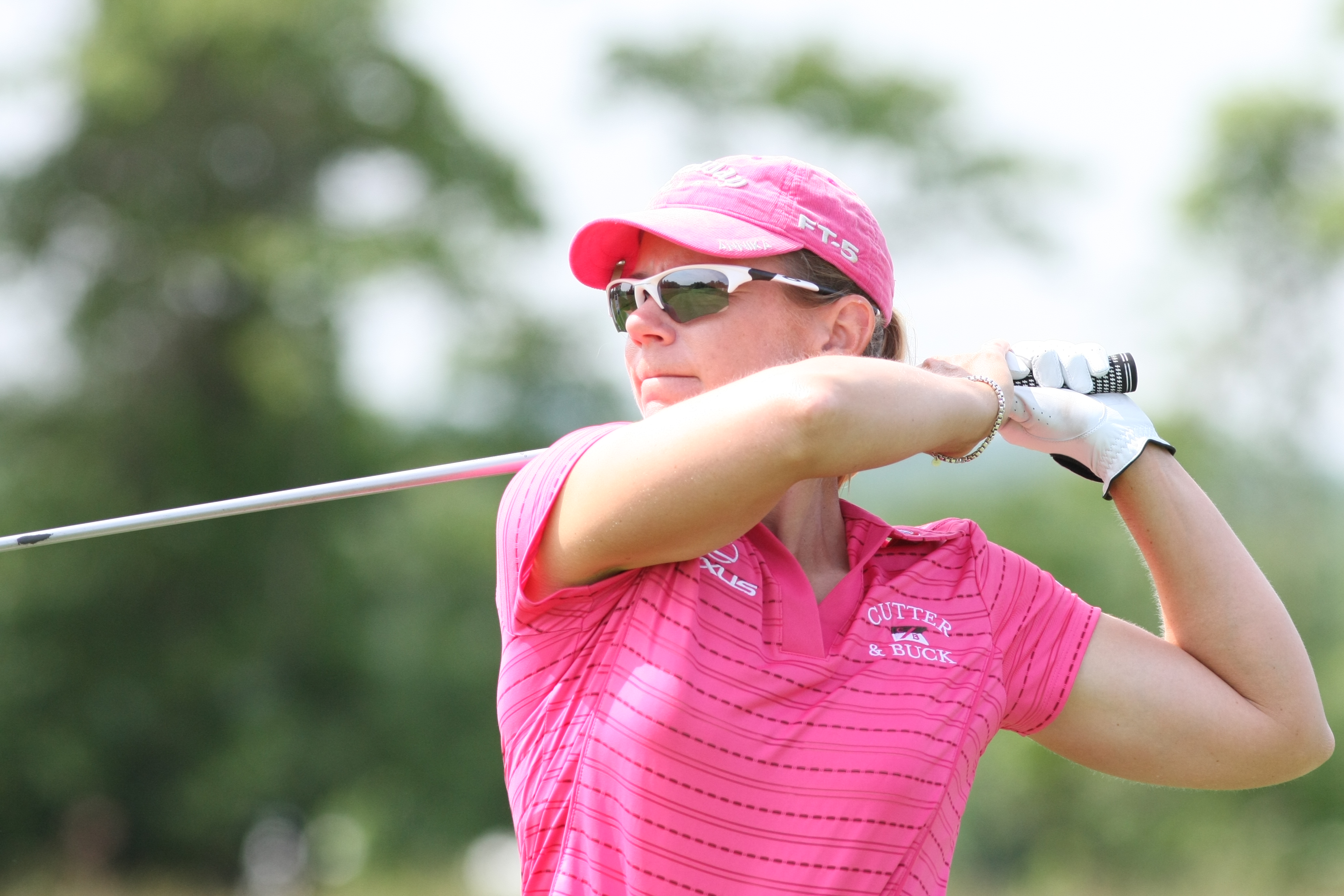 AAAA9576